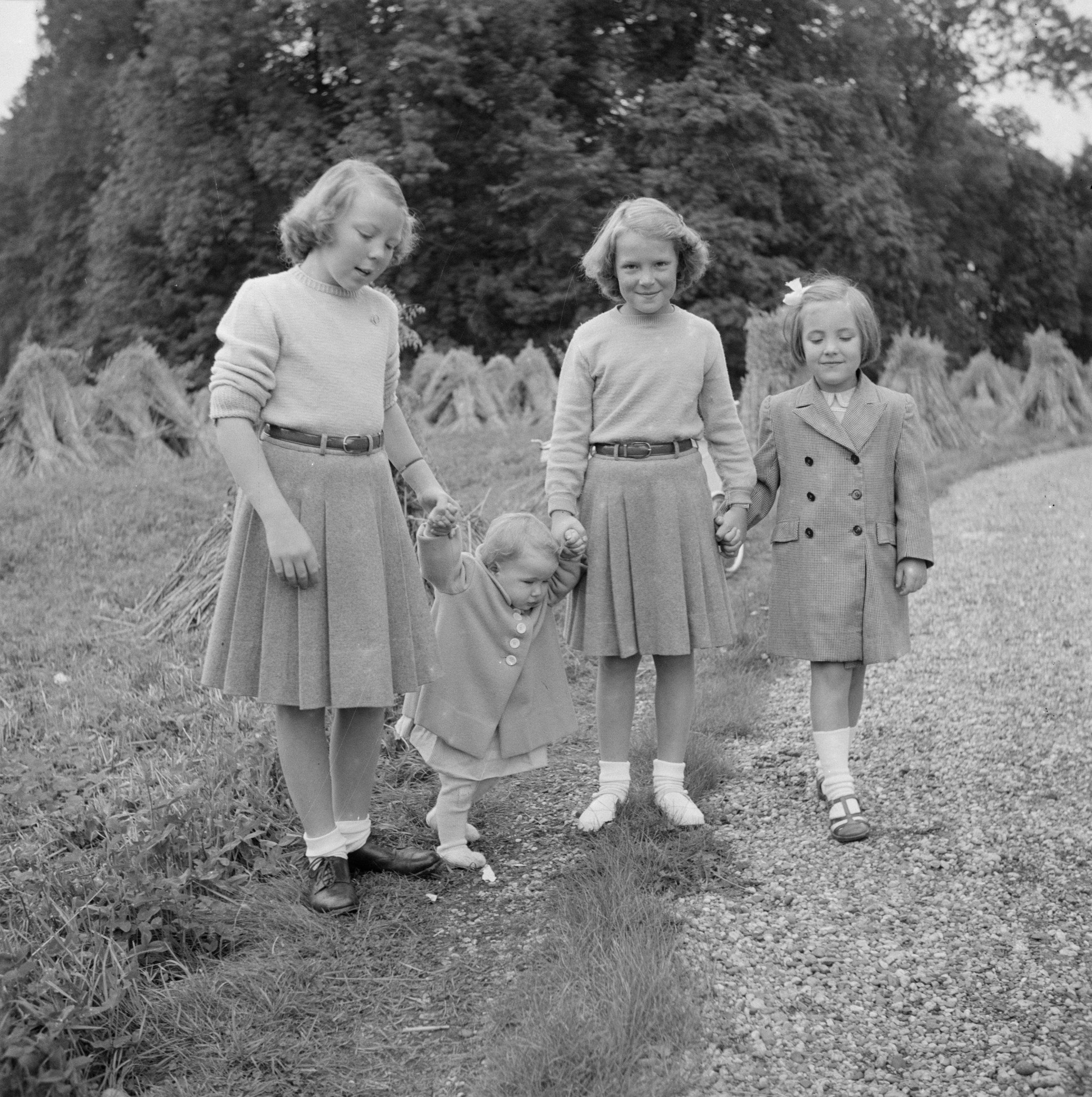 Collectie / Archief : Fotocollectie Van de Poll Reportage / Serie : De prinsessen Beatrix, Irene, Margriet en Christina op paleis Het Loo Beschrijving : De prinsessen Beatrix, Irene, Margriet en Christina wandelen in het park van het paleis Datum : 19 augustus 1948 Locatie : Apeldoorn, Gelderland Trefwoorden : koninklijk huis, prinsessen Persoonsnaam : Beatrix (prinses Nederland), Christina (prinses Nederland), Irene (prinses Nederland), Margriet (prinses Nederland) Fotograaf : Poll, Willem van de Auteursrechthebbende : Nationaal Archief Materiaalsoort : Negatief (zwart/wit) Nummer archiefinventaris : bekijk toegang 2.24.14.02 Bestanddeelnummer : 255-7522